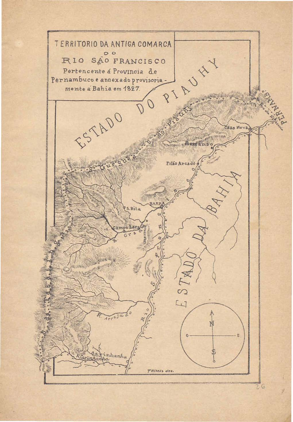 Território da Antiga Comarca do Rio São Francisco. Pertencente á provincia de Pernambuco e annexado provisoriamente à Bahia em 1827.